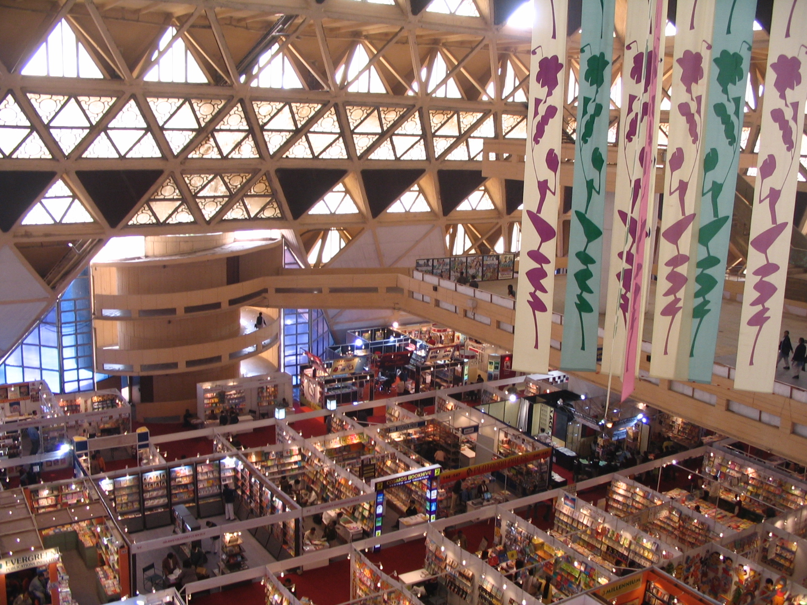 Hall no 6 in Pragati Maidan, New Delhi, India